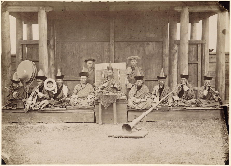 Хамбо-Лама Тамчинского дацана. 1886 год.